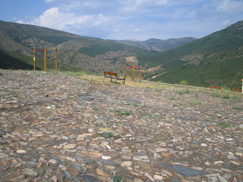 Eras pavimentadas de El Atazar.